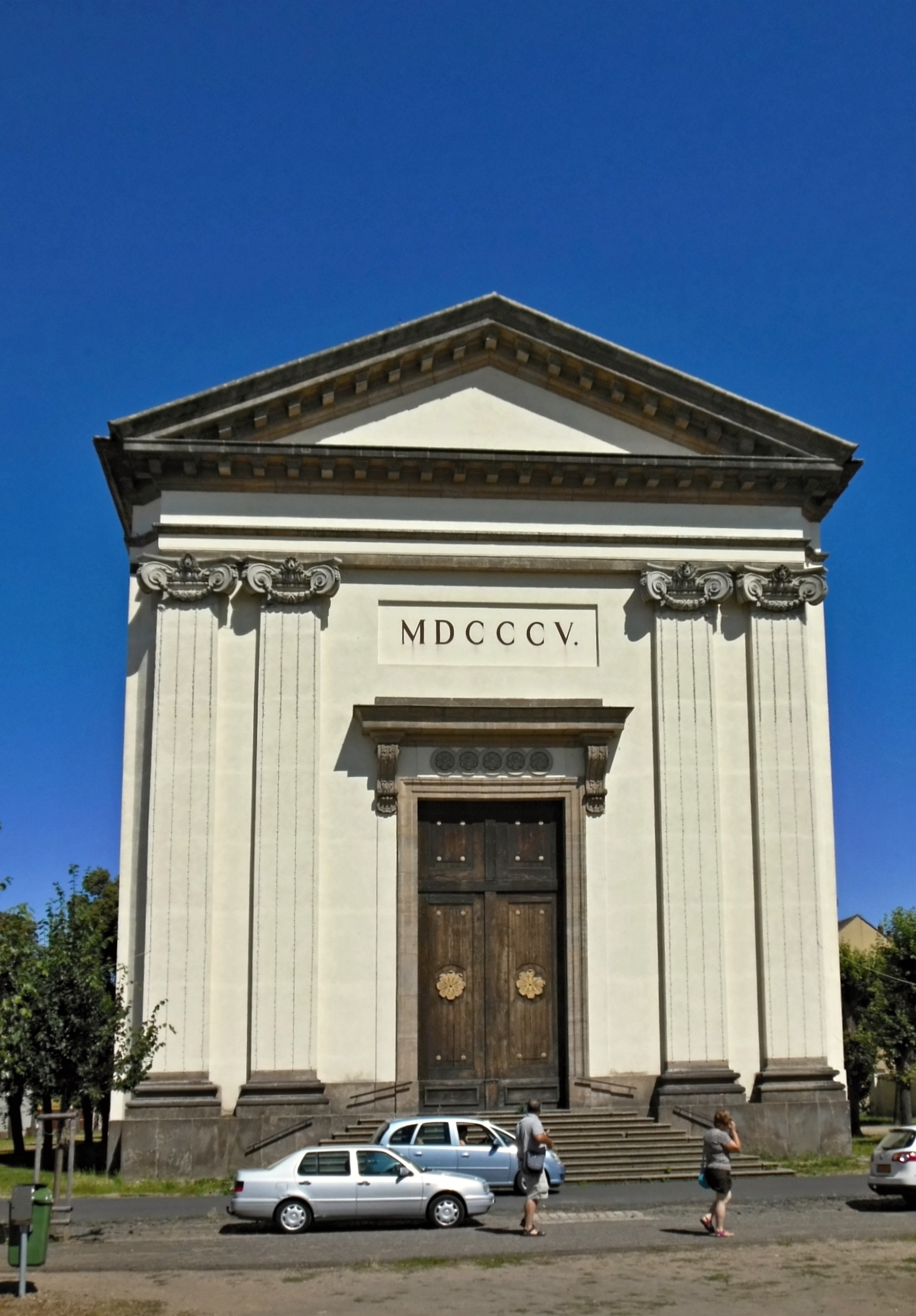 Kostel Vzkříšení Páně na náměstí Československé armády (ČSA) v Terezíně (okres Litoměřice).